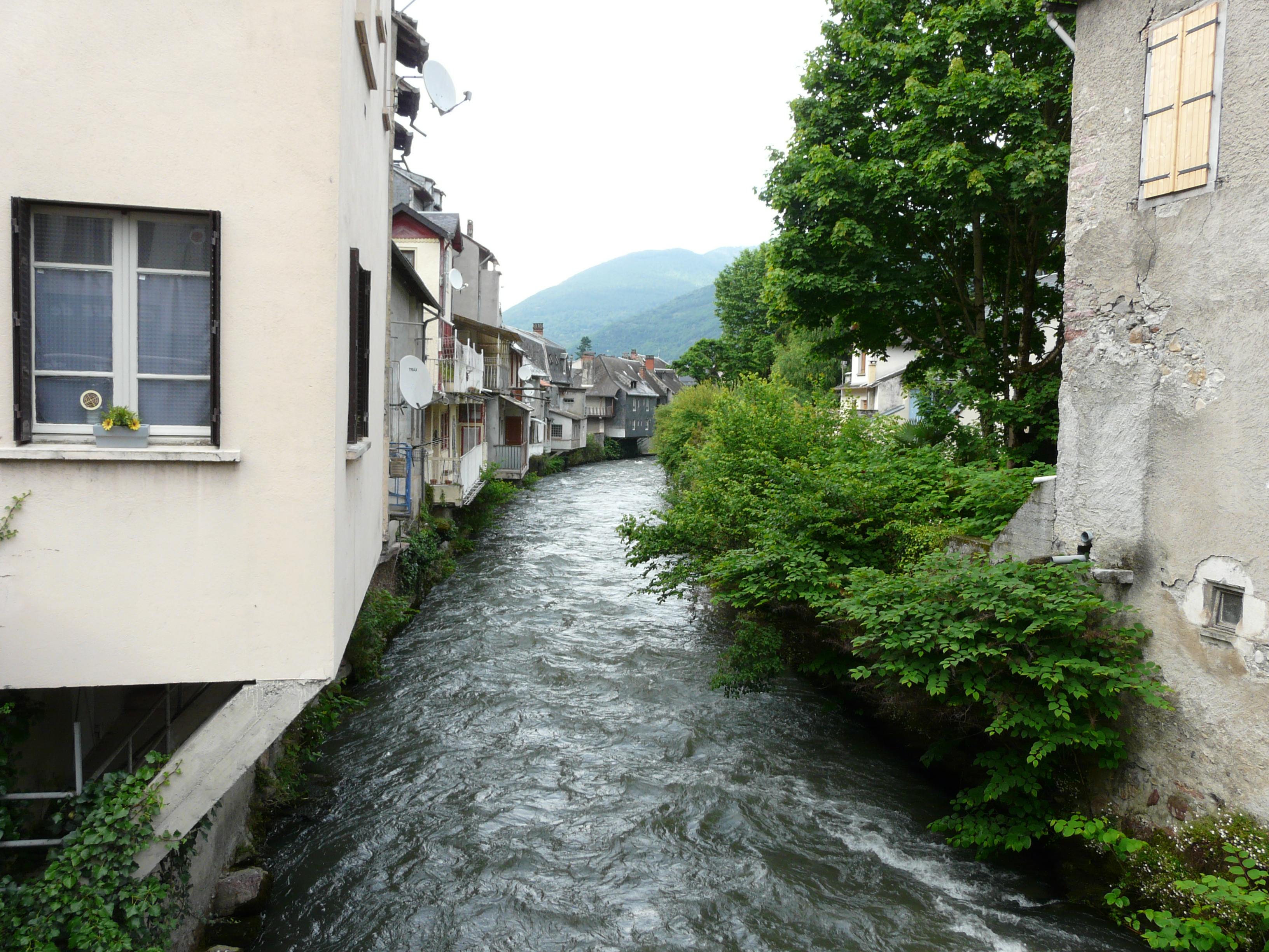 La Pique en aval du pont de la route départementale 44,,Cierp-Gaud, Haute-Garonne, France.